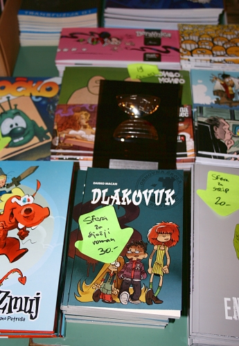 Dlakovuk i nagrada SFERA za roman za djecu na SFeraKonu u Zagrebu